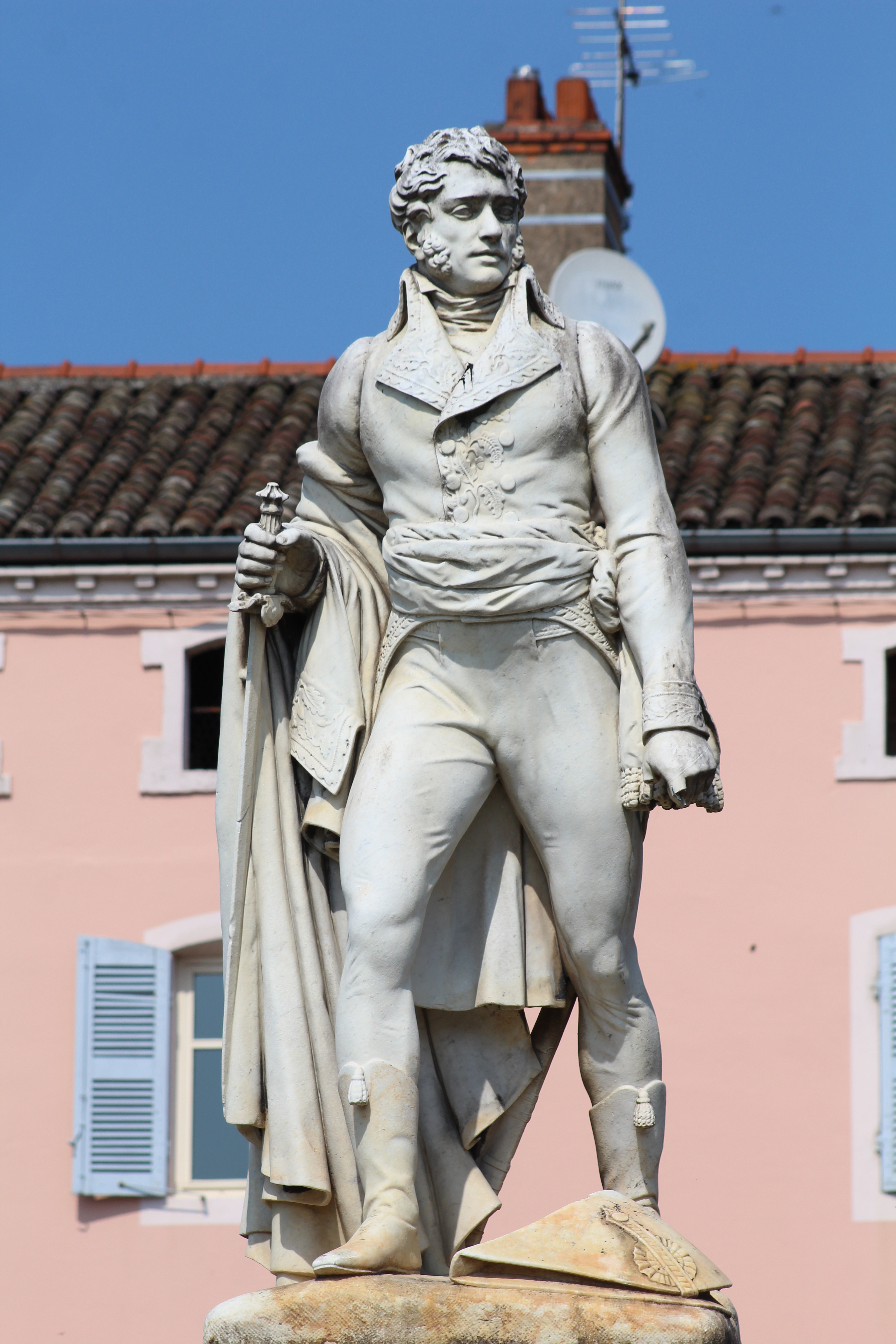 Statue du général Joubert, place Joubert, Pont-de-Vaux.